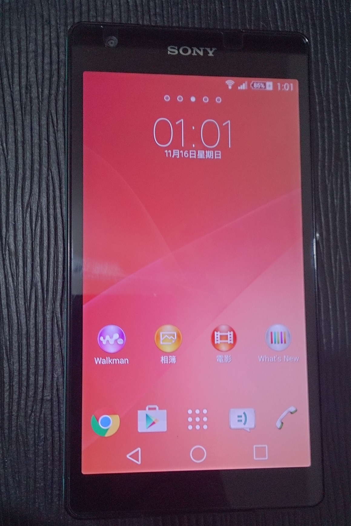 Sony Mobile智慧型手機Xperia Z2a正面。